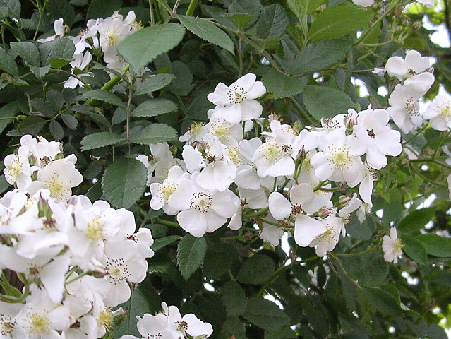 ノイバラ （神奈川県横浜市）Rosa multiflora (Yokohama, Kanagawa, JAPAN)